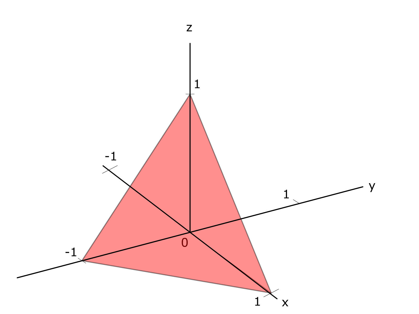 Miller Index (1-11)